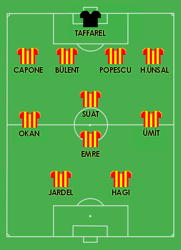 Galatasaray lineup, Galatasaray SK vs. Real Madrid, 26 August 2000, European Super Cup Final